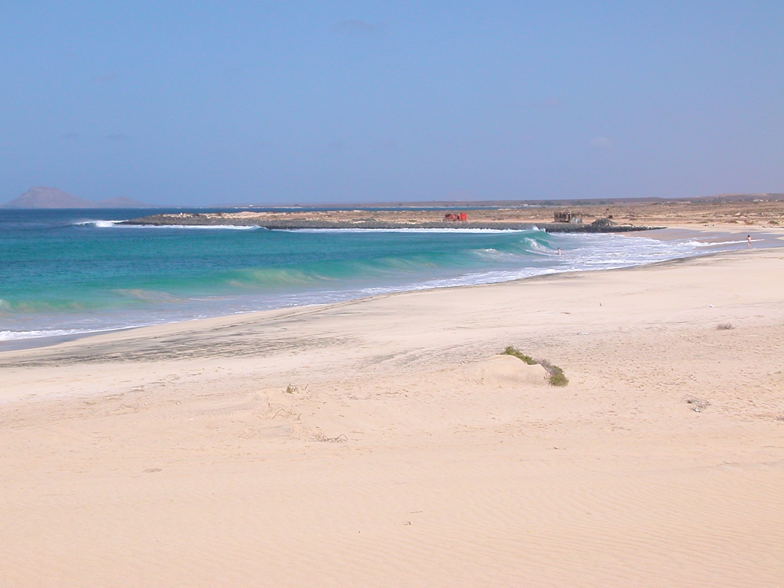 sal cape verde punta pedra